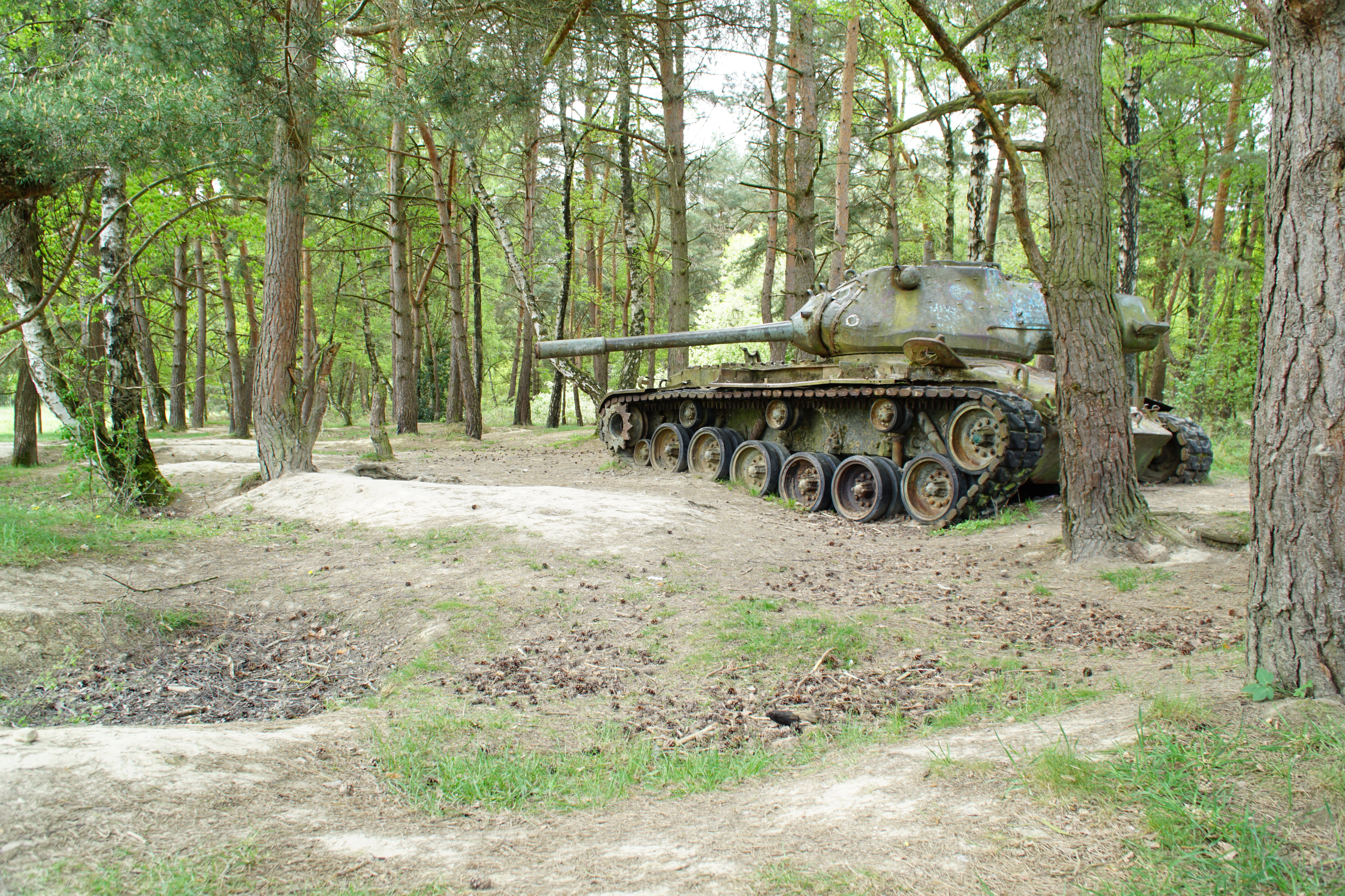 Ausgedienter Panzer im Naturschutzgebiet „Brander Wald“ (NSG ACS-012) in Aachen. Das Naturschutzgebiet ist auch Standortübungsplatz. Die Fahrspuren bilden „Kleinstgewässer“, in denen wohl seltene und bedrohte Tierarten ihren Lebensraum finden.